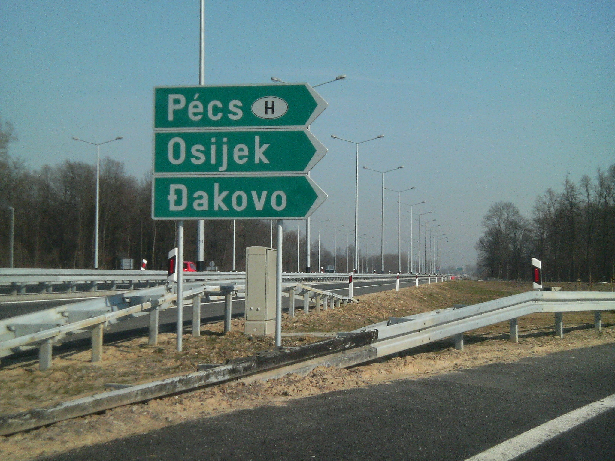 Zeleni prometni znakovi na čvorištu autocesta A3 i A5 nedaleko od Sredanaca u Hrvatskoj.